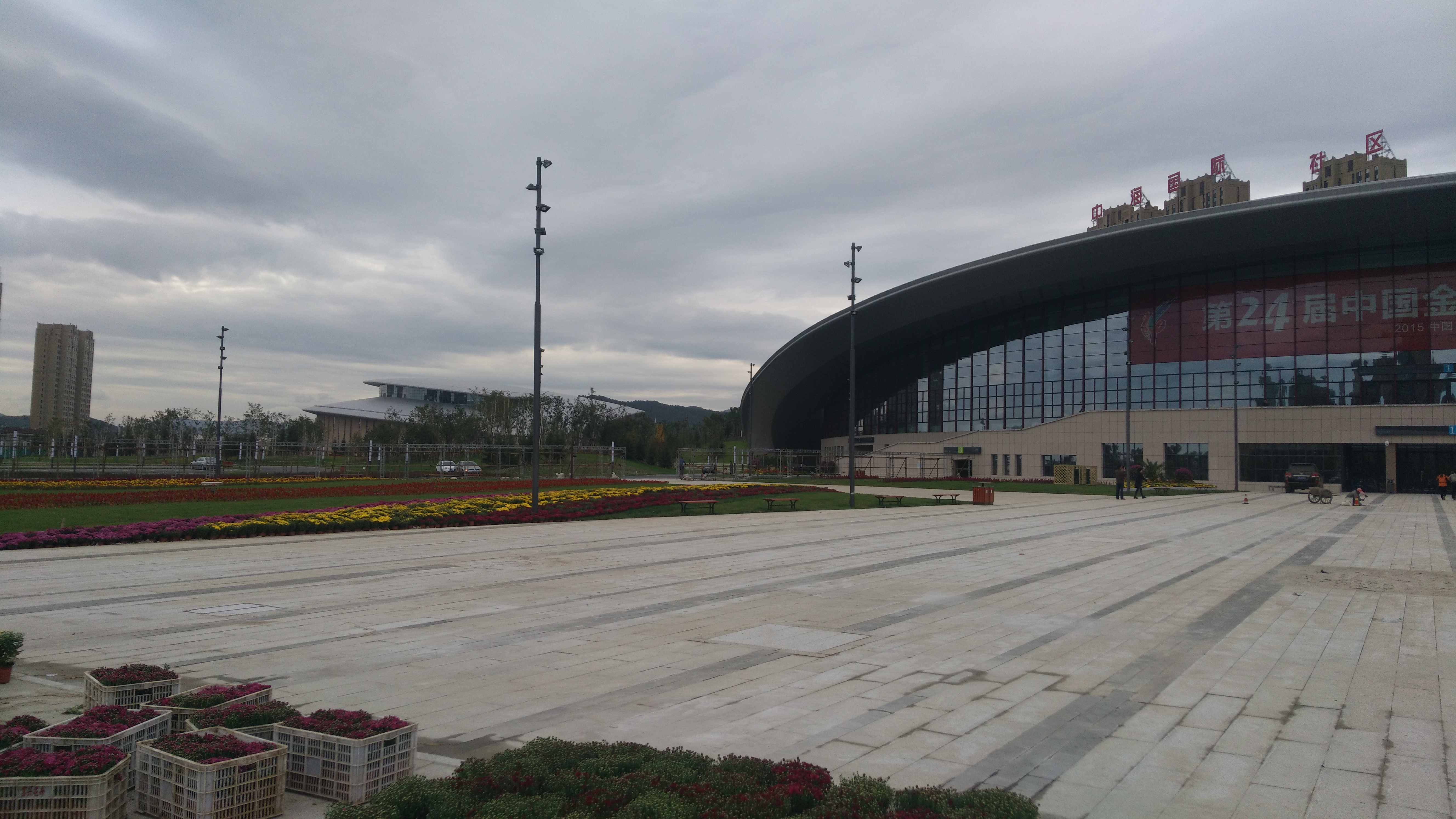 吉林市东山文化体育中心，即吉林市人民大剧院和吉林市全民健身中心